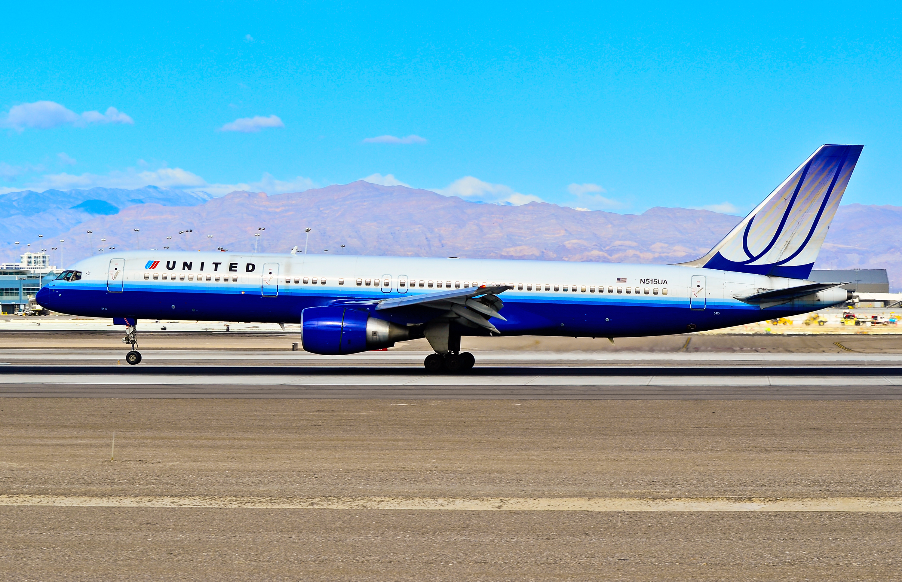 Las Vegas - McCarran International (LAS / KLAS) USA - Nevada, December 03, 2011 Photo: Tomás Del Coro